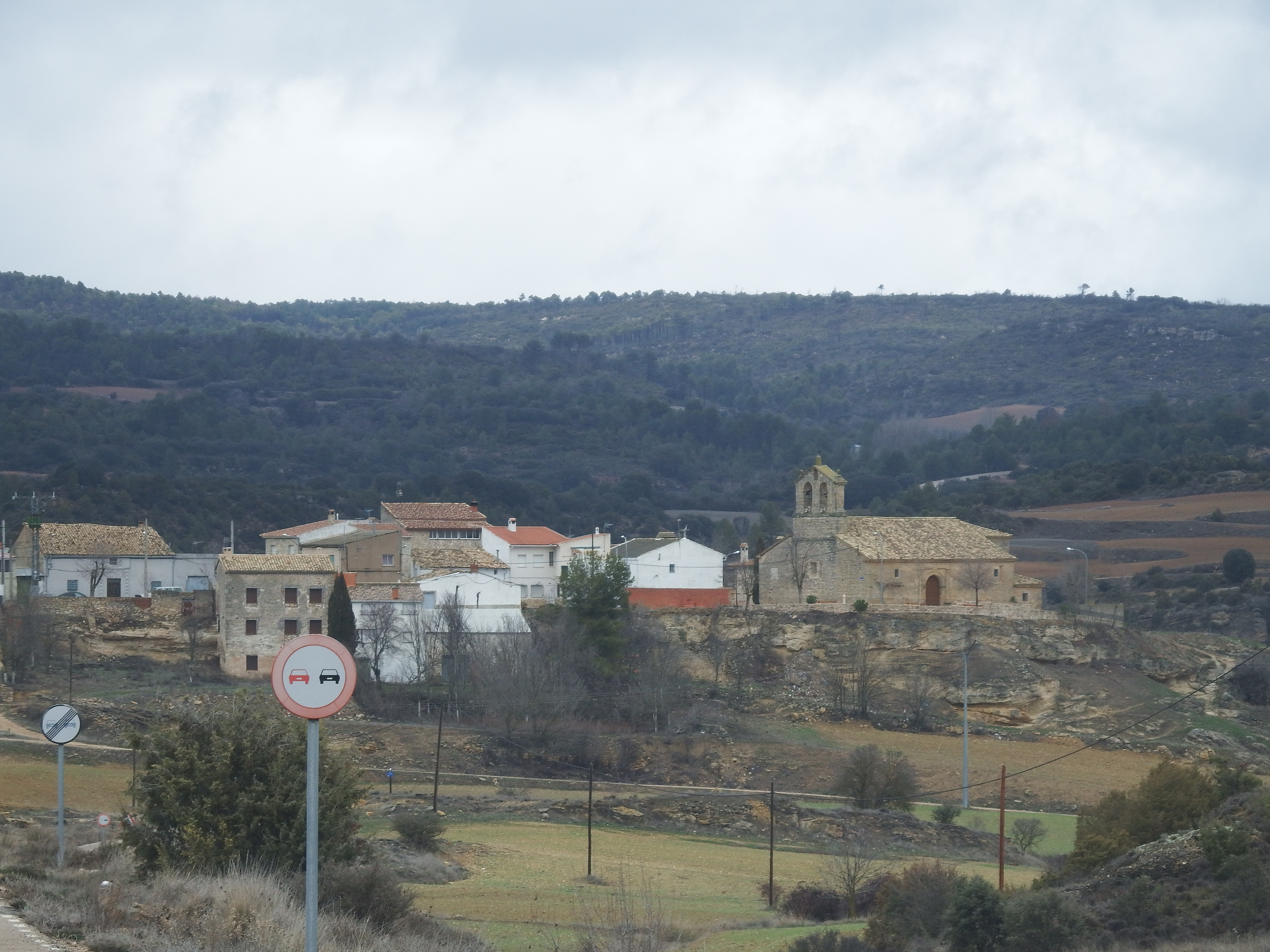 Vista general del pueblo